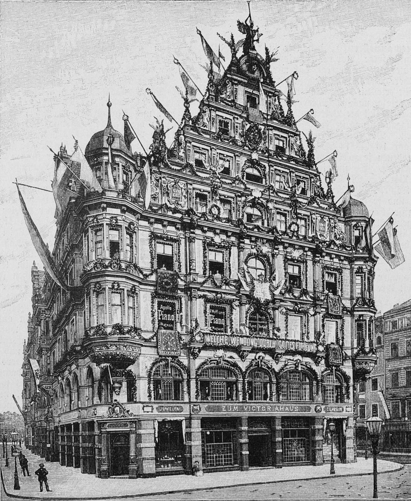 Das Viktoriahaus in Dresden im preisgekrönten Sedanfestschmuck. Artikelbebilderung in der Illustrierten Die Gartenlaube, vermutlich nach einem Foto des Dresdner Vereins zur Förderung des Fremdenverkehrs. Anlässlich des am 2. September begangenen Sedantages wurde das Dresdner Viktoriahaus besonders geschmückt.